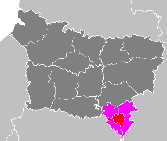 Carte du canton de Château-Thierry